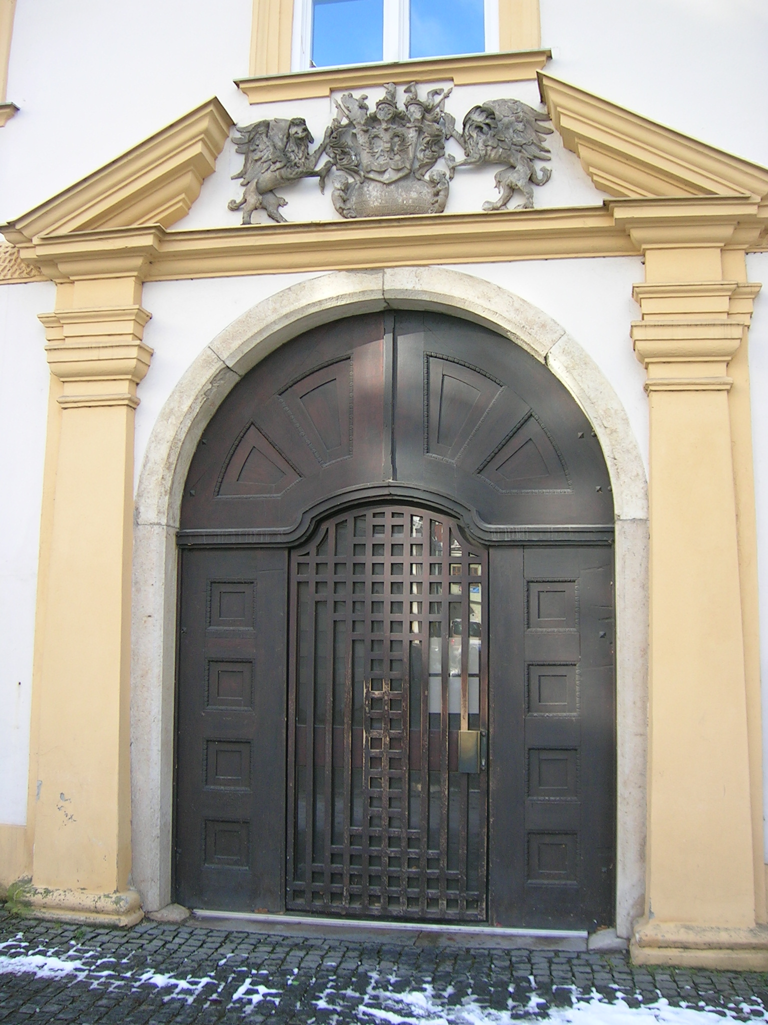 Pater-Philipp-Jeningen-Platz 6 Eichstätt: Portal des Ulmer Hof.